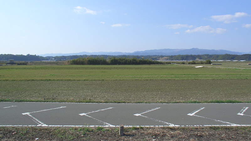 くま川鉄道湯前線ja:木上駅 駅周辺 ホーム上から北側を見る。 堤の向こうがja:球磨川。 撮影者/著者/著作権保有者 : MK Products (本人がアップロード) 撮影日 : 2007/03/14 木上駅用にアップロードした画像です。良い画像があれば別の画像に変えてください。